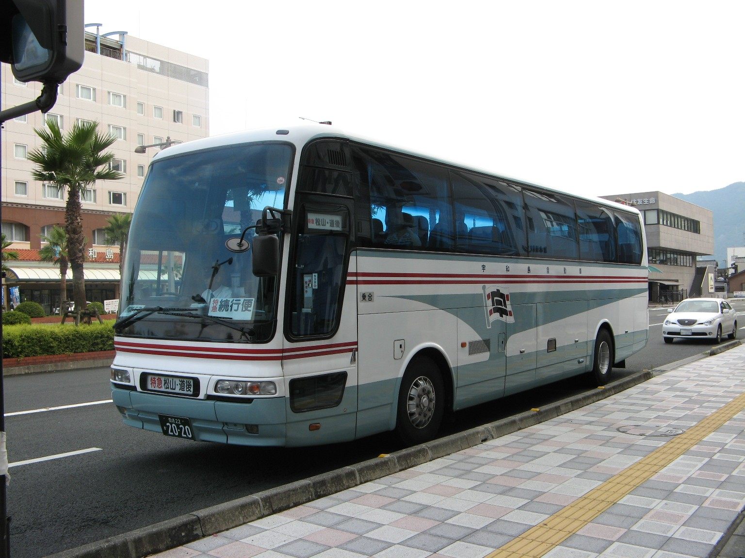 宇和島自動車2020（特急バス）